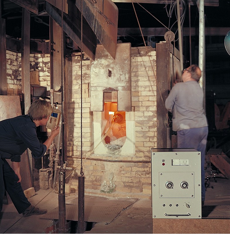 Original image description from the Deutsche Fotothek Glaswerk